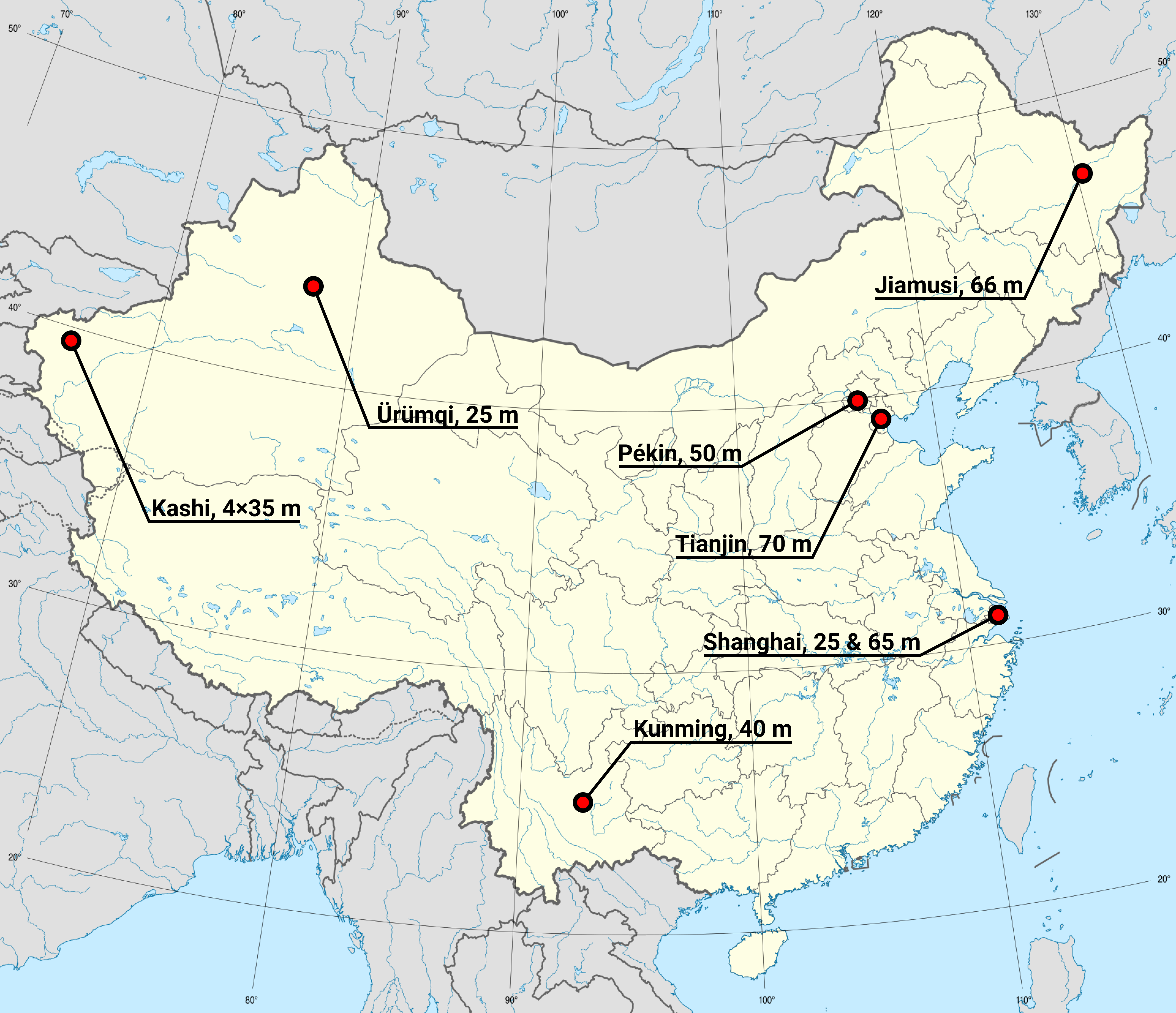 A map of China with the location of its deep space network stations, with the diameter of each antenna. The name of cities are written in french.